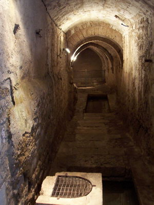 Fontaine souterraine d'Airvault